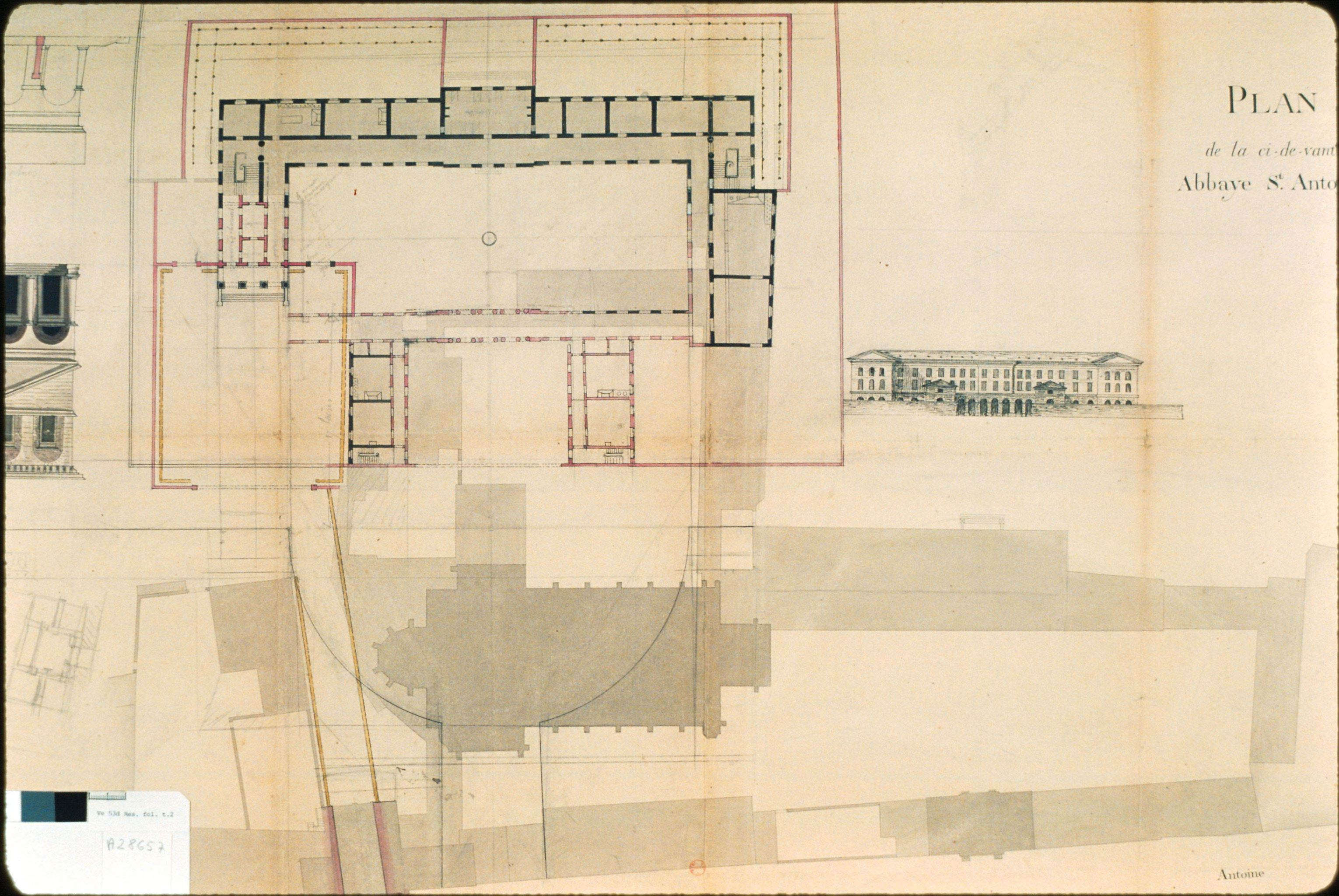 Plan de la ci-de-vant Abbaye St Antoine [des Champs]. [Ca 1800].